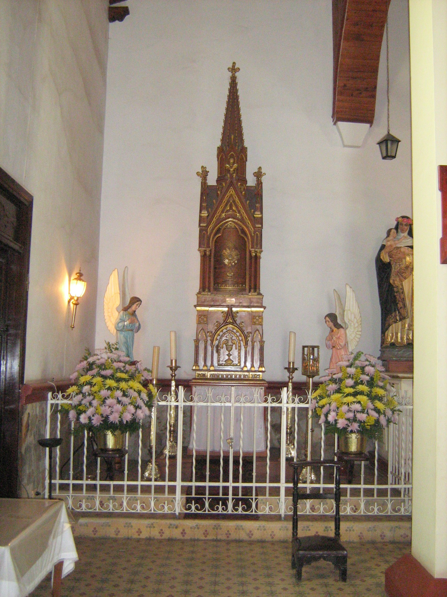 Capilla del Señor de la Humildad, municipio de Santa Rosa de Osos, Antioquia, Colombia.